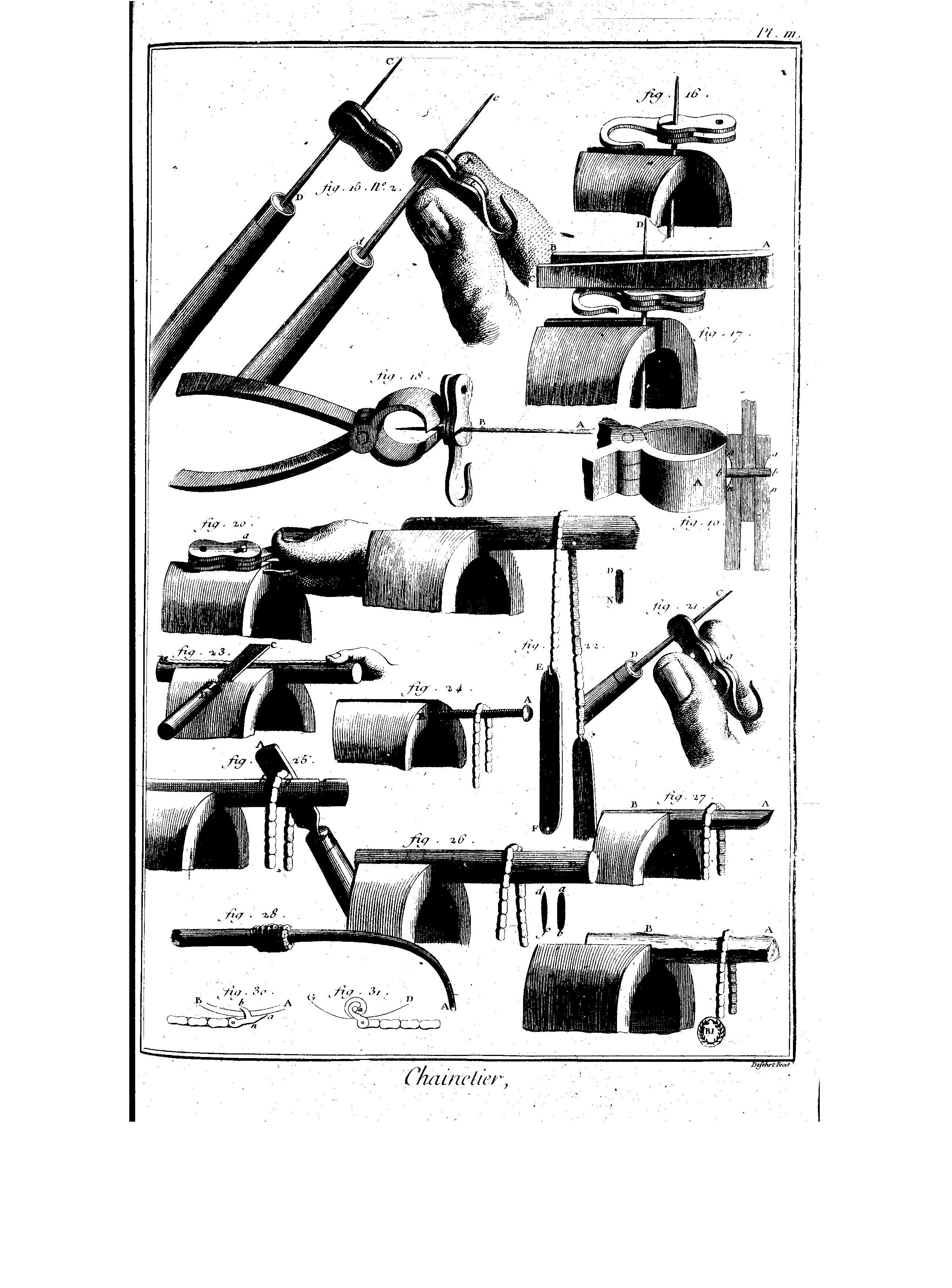 Planches de l'Encyclopédie de Diderot et d'Alembert, volume 2